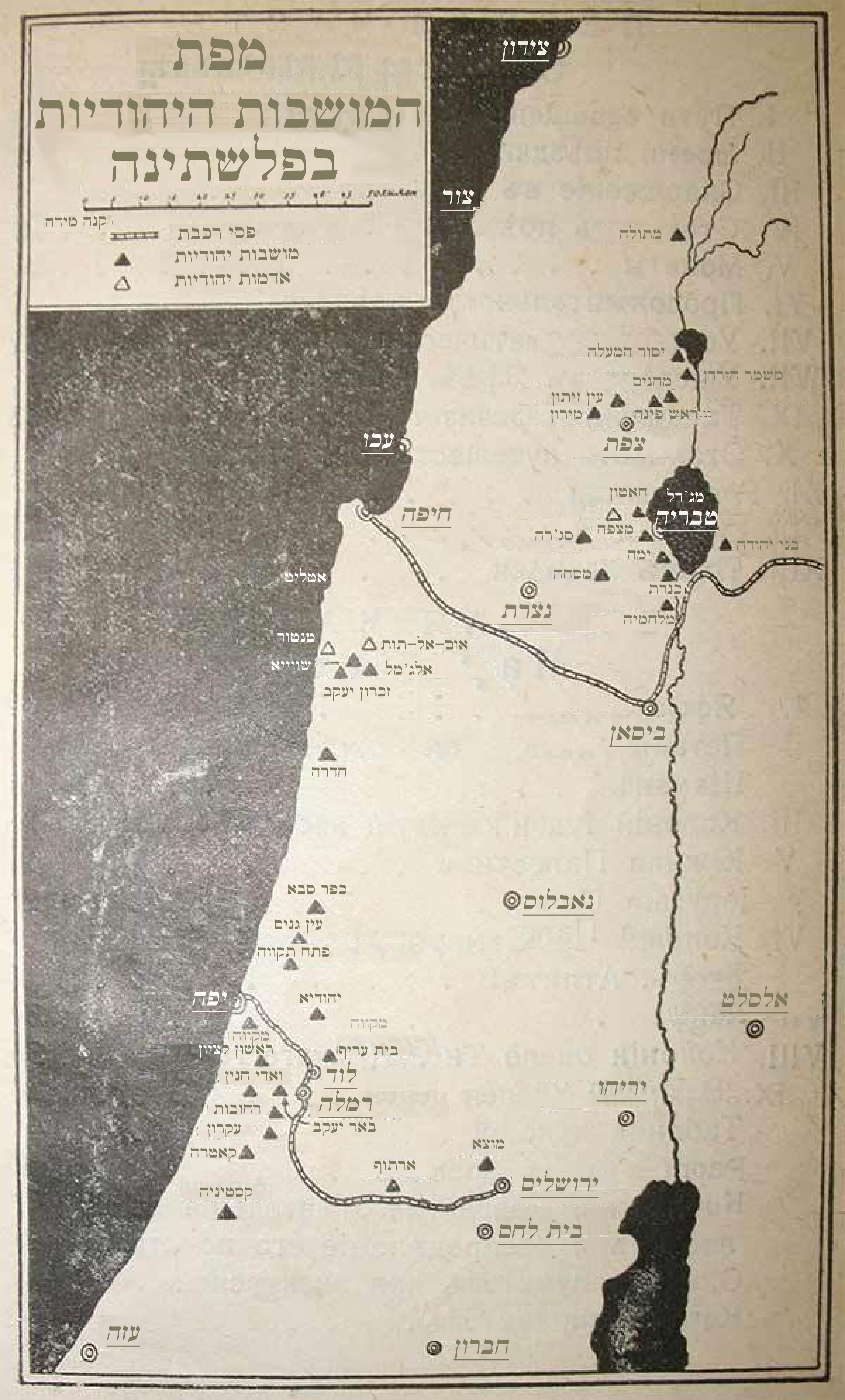 המקור: המדריך הקצר ליהודים המטיילים בפלשתינה, וילנה, "קדימה" 1911